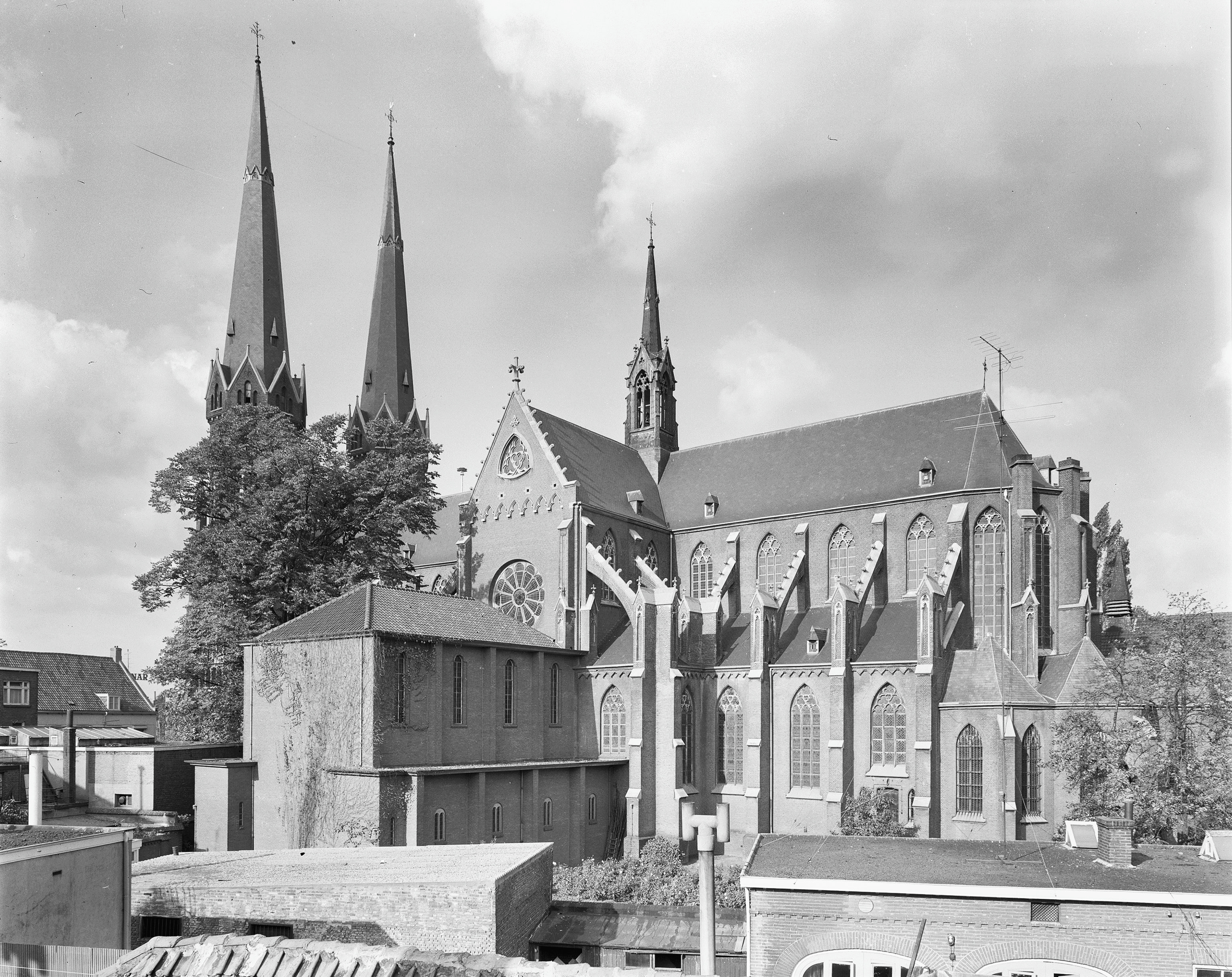 Rooms-Katholieke Kerk: exterieur